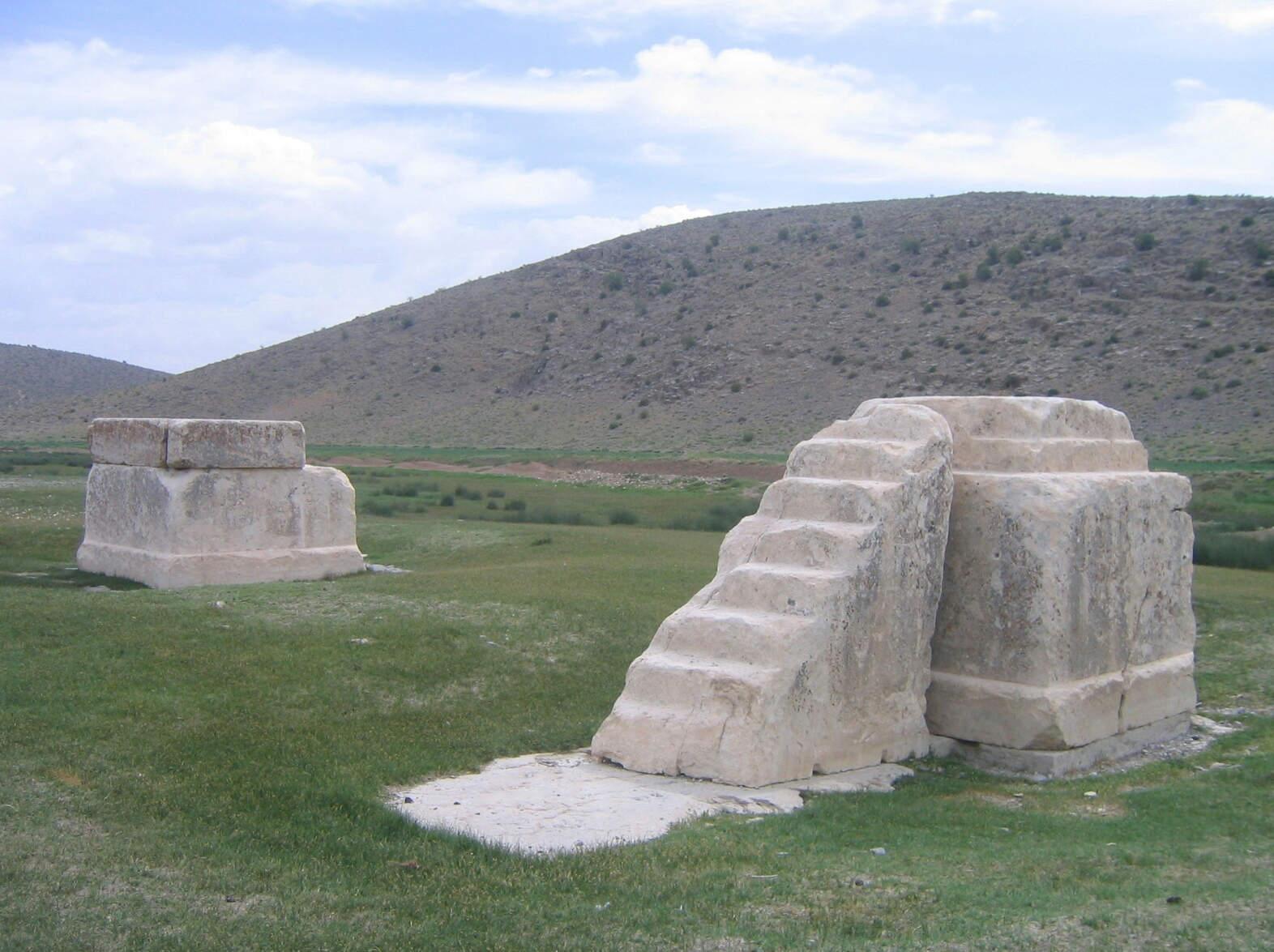 باستان شناسی